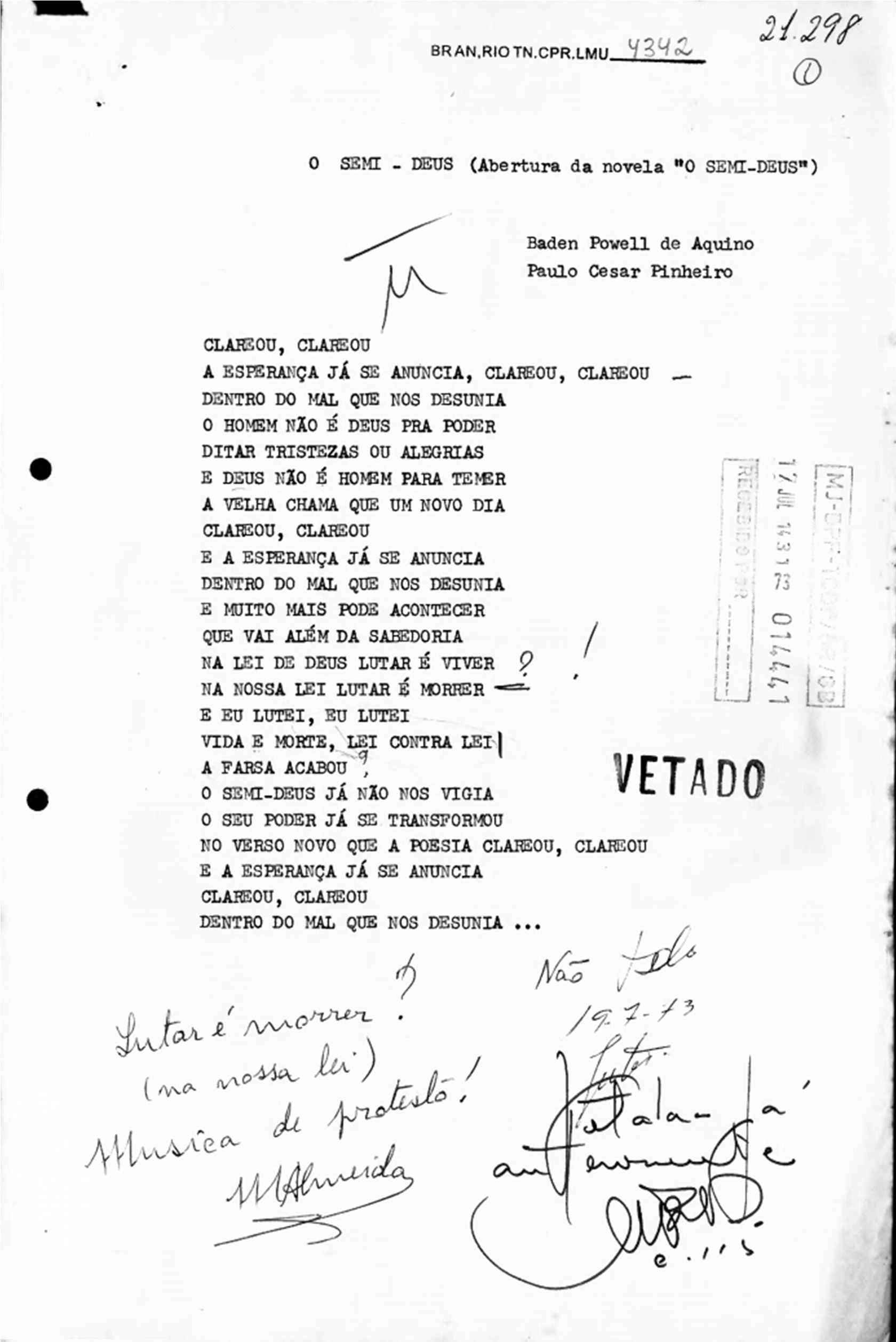 Censura a letra da música Semi-deus, de Baden Powell e Paulo Cesar Pinheiro. Tema de abertura na Novela O Semi-Deus. Serviço de Censura e Diversões Públicas